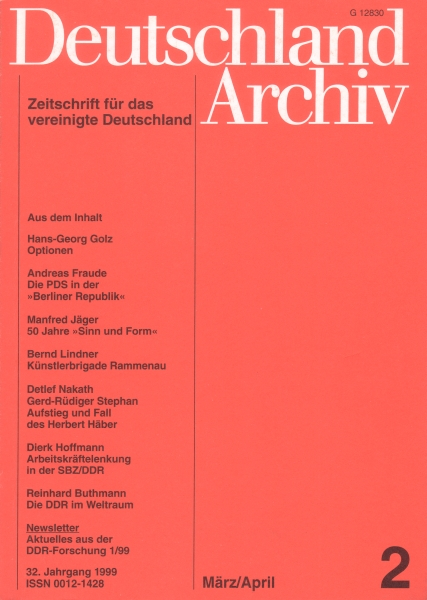 Cover des Deutschland Archivs, Heft 2, 1999.